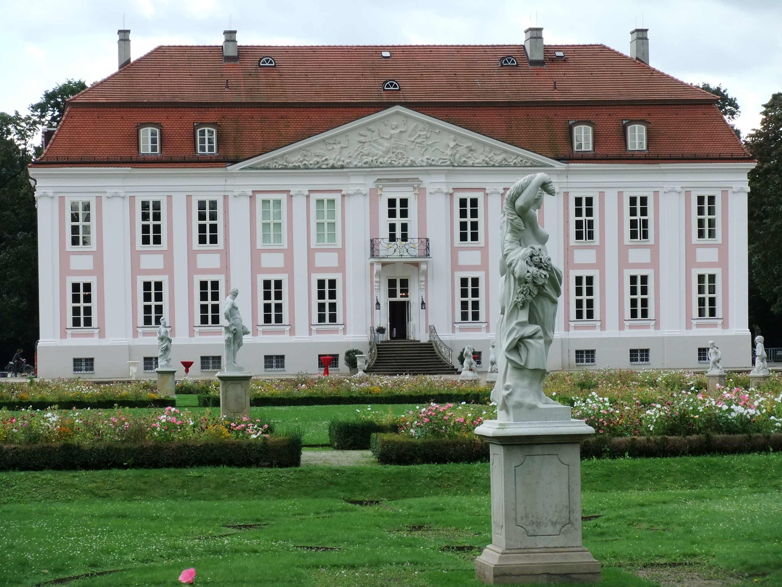 Denkmalliste Berlin OBJ-Dok-Nr.: 09040162 - Berlin Friedrichsfelde Am Tierpark, Schloß Friedrichsfelde, 1695 von Johann Arnold Nering, Umbau 1719 von Martin Heinrich Böhme (Gesamtanlage)